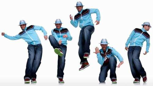 Taneční styl z 80. let